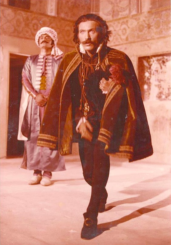 Кадр из фильма "Пьетро Делла Валле" (1976). Cтанко Мольнар в роли Пьетро Делла Валле. Фото сделано во время съемок фильма другом Станко Витторио Менезини для личного архива Станко Мольнара